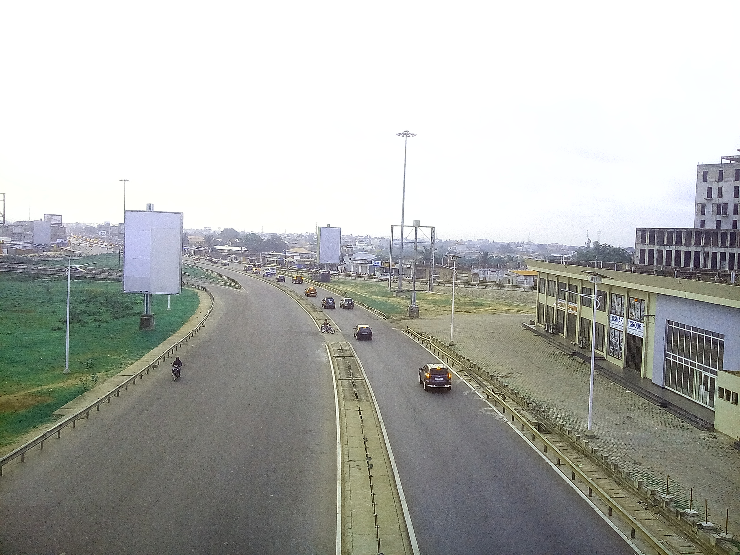 Échangeur de Godpmey reliant Abomey-Calavi et Cotonou. This is an image with the theme "Africa on the Move or Transport" from: Benin